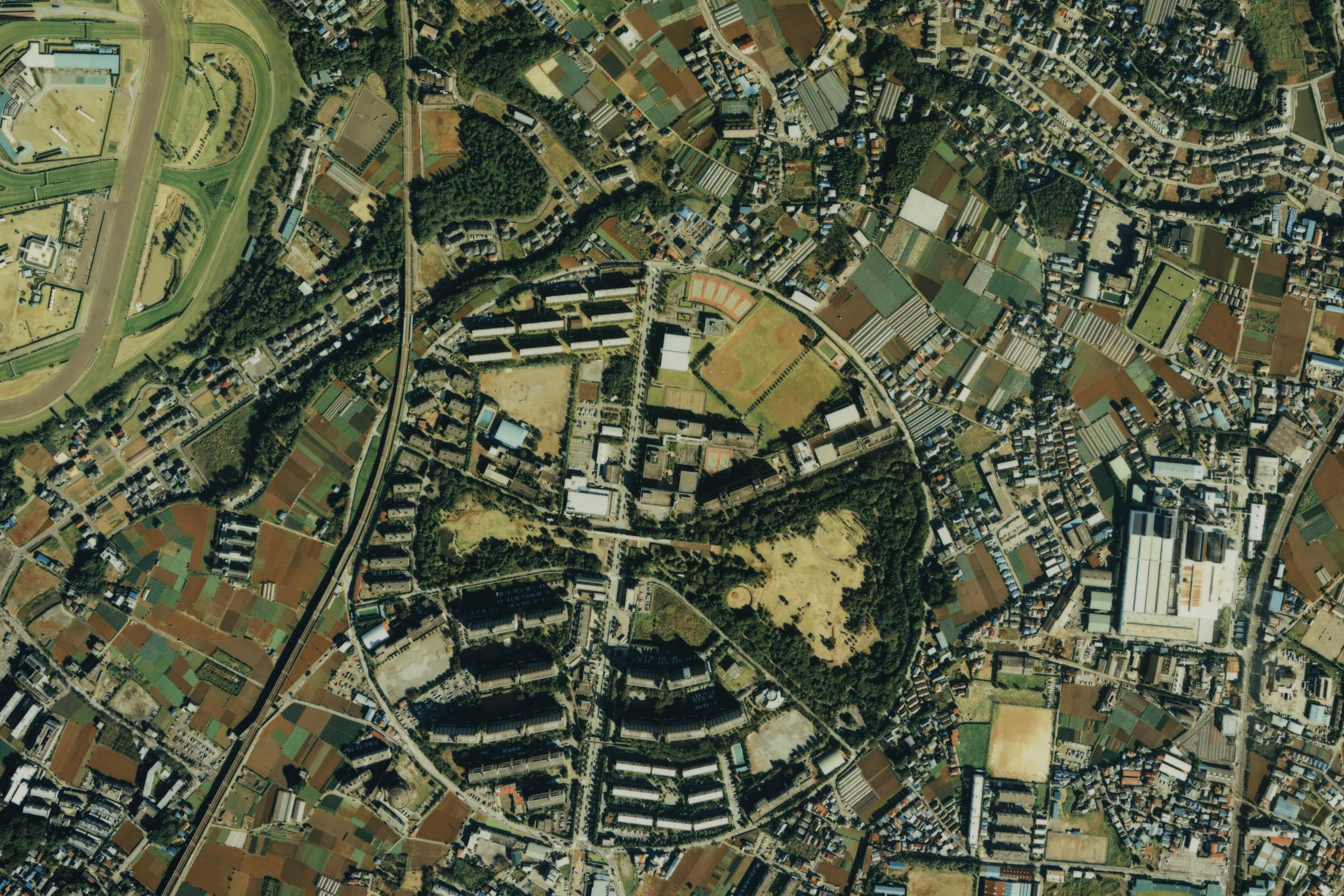 船橋市行田の空中写真。ckt-89-3_c3_52を使用。1989年撮影。 The copyright holder of this file, the Ministry of Land, Infrastructure, Transport and Tourism of Japan, allows anyone to use it for any purpose, provided that the copyright holder is properly attributed. Redistribution, derivative work, commercial use, and all other use is permitted. Attribution: Copyright © National Land Image Information (Color Aerial Photographs), Ministry of Land, Infrastructure, Transport and Tourism This image is copyrighted by the Ministry of Land, Infrastructure, Transport and Tourism of Japan. For terms of use, see the stipulation to use of National Land Information (in Japanese) and message from MLIT (in Japanese and English). When you display this image on an article, include the following phrase in the description: "Made based on [ National Land Image Information (Color Aerial Photographs)], Ministry of Land, Infrastructure, Transport and Tourism".